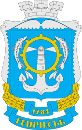 Герб міста Генічеськ